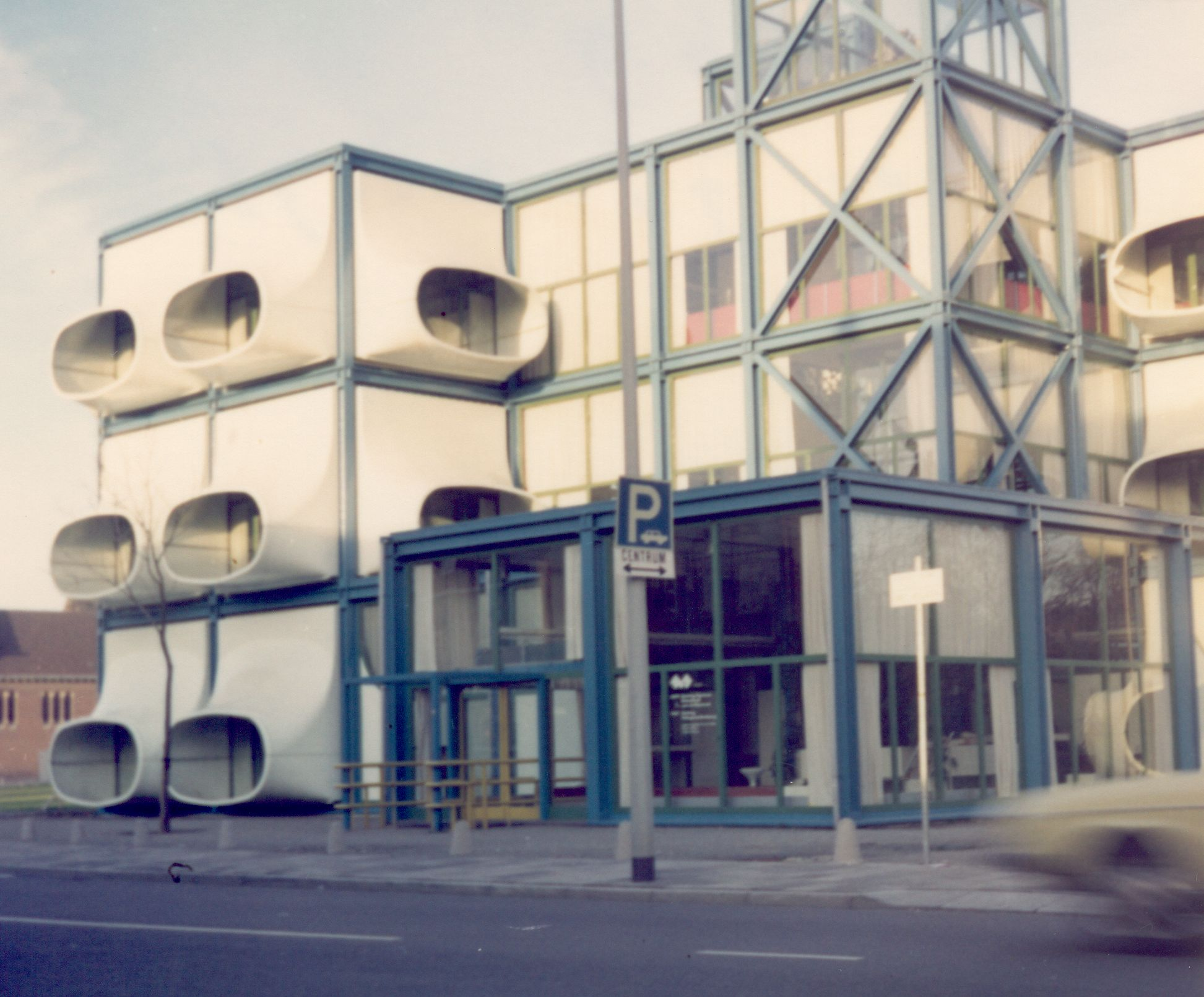 Het voormalige AZM kantoor in Heerlen, gebouwd door Laurens Bisscheroux in 1972, later nog uitgebreid en uiteindelijk gesloopt rond 1990. De opname is gemaakt in 1976 door Erwin Meijers.